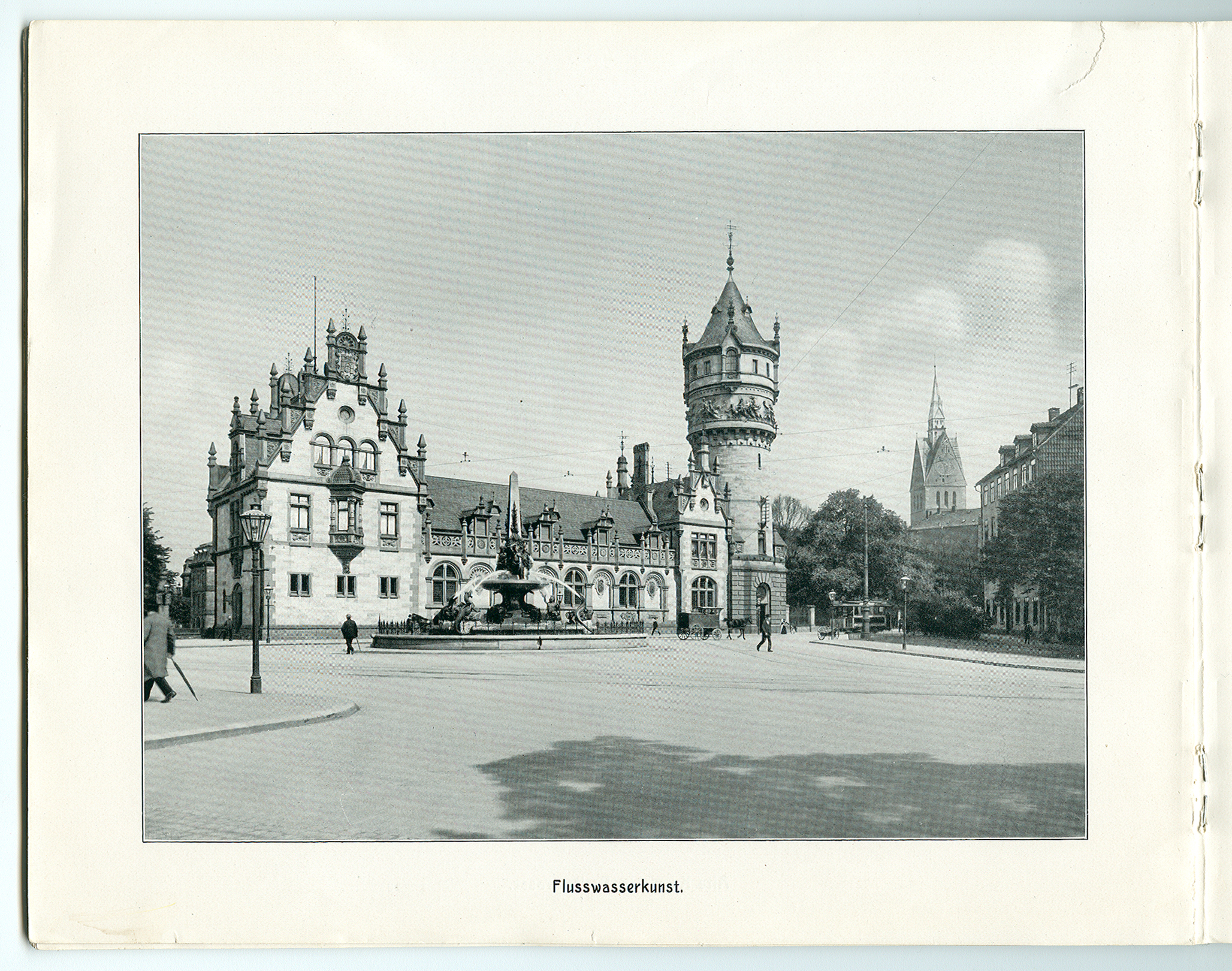 „Hannover – 26 Ansichten nach künstlerischen Aufnahmen“ von Karl F. Wunder. – Flusswasserkunst.